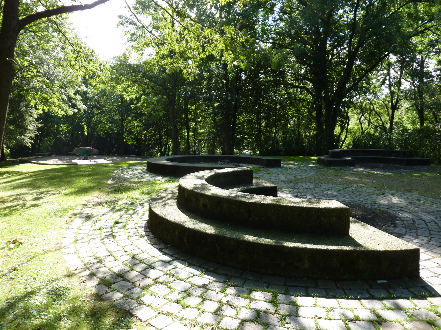 Klophaus-Park in Wuppertal, Sitzgelegenheiten aus Stein